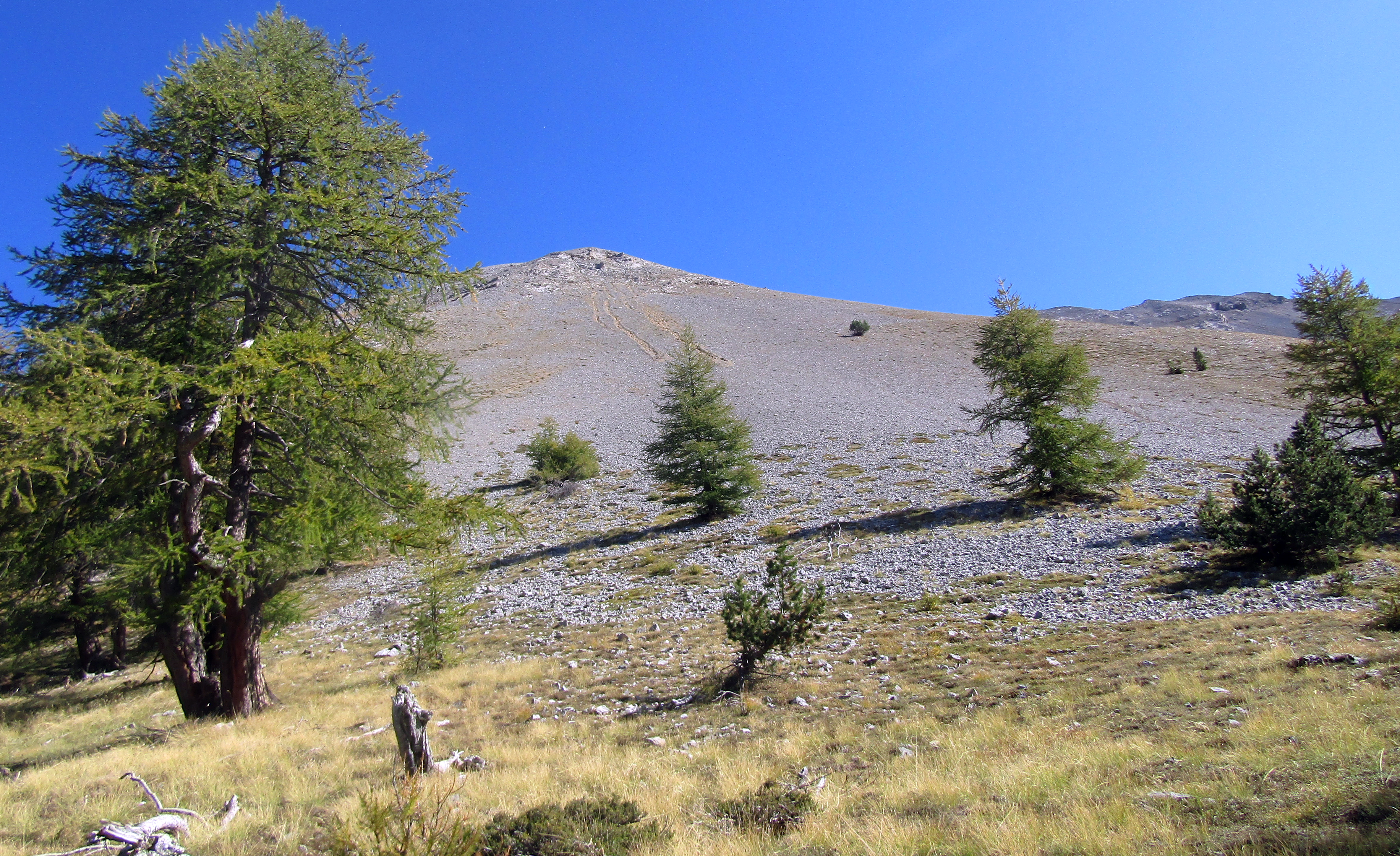 Pointe de Pécé - Massif des Cerces